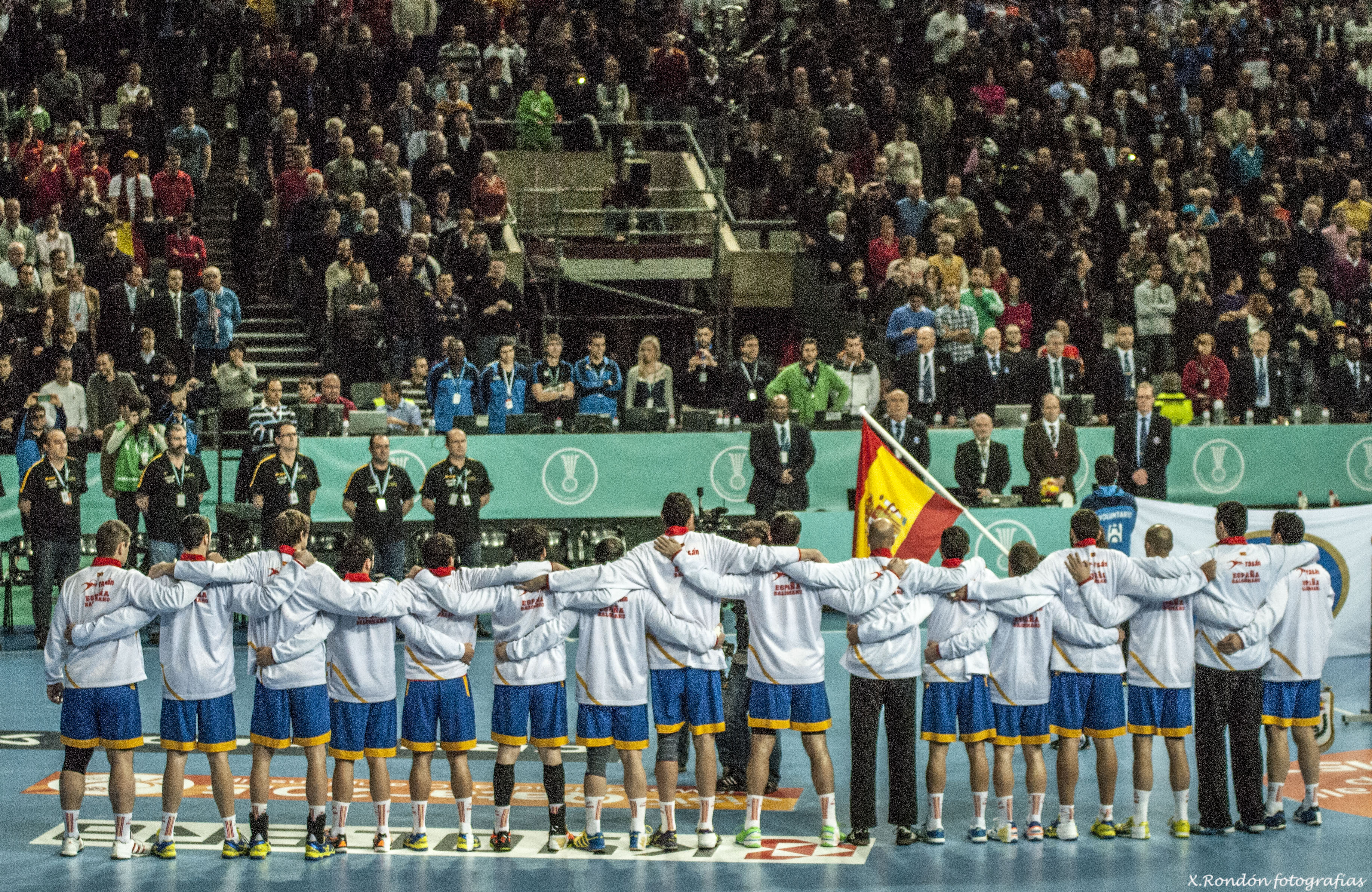 España-Eslovenia